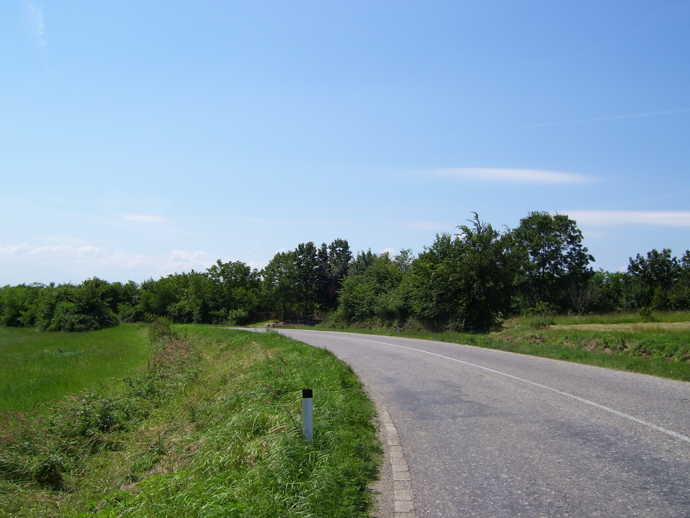 Аутор слике је корисник:SRB Maric IT Слика је урађена обичним фотоапаратом. Датум: 10-07-2010